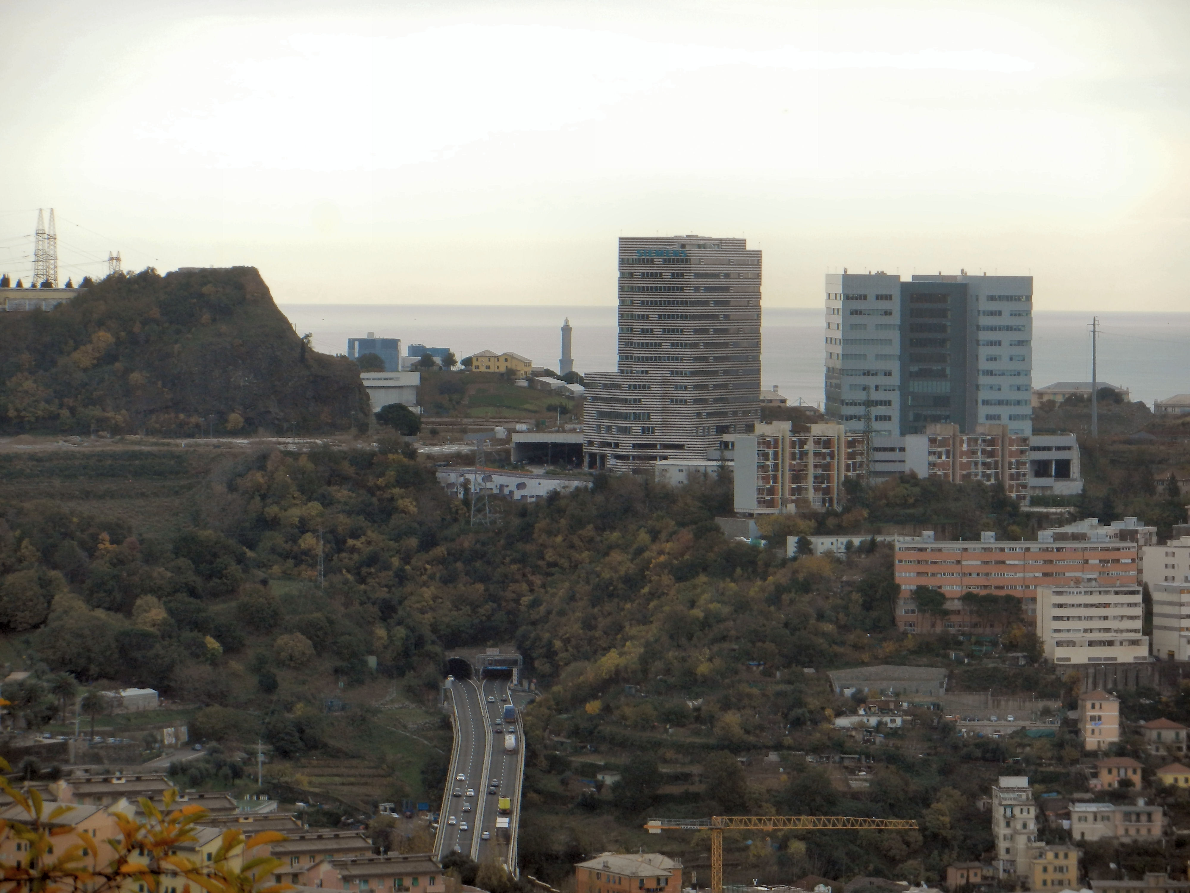 Genova Cornigliano, Erzelli (dicembre 2014)